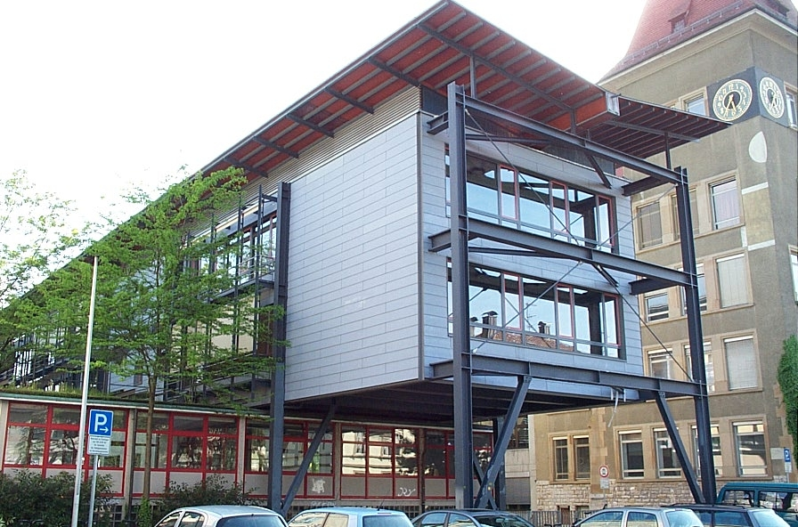 Altes Hebel-Gymnasium Lörrach, heute Museum am Burghof, Stadtkirche